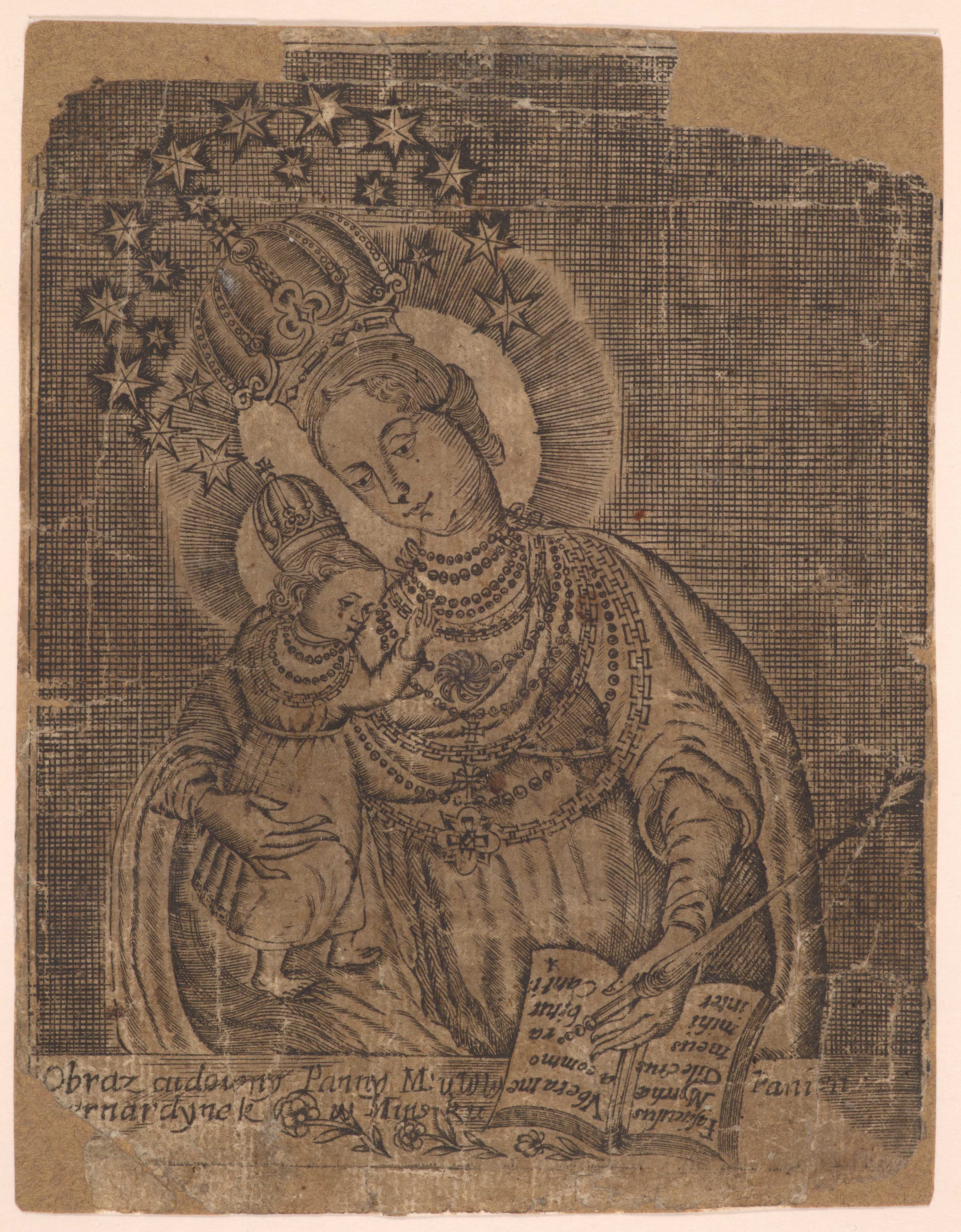 Беларуская (тарашкевіца): Абраз Маці Божай з касьцёла бэнэдыктынак у Менску (Miensk)